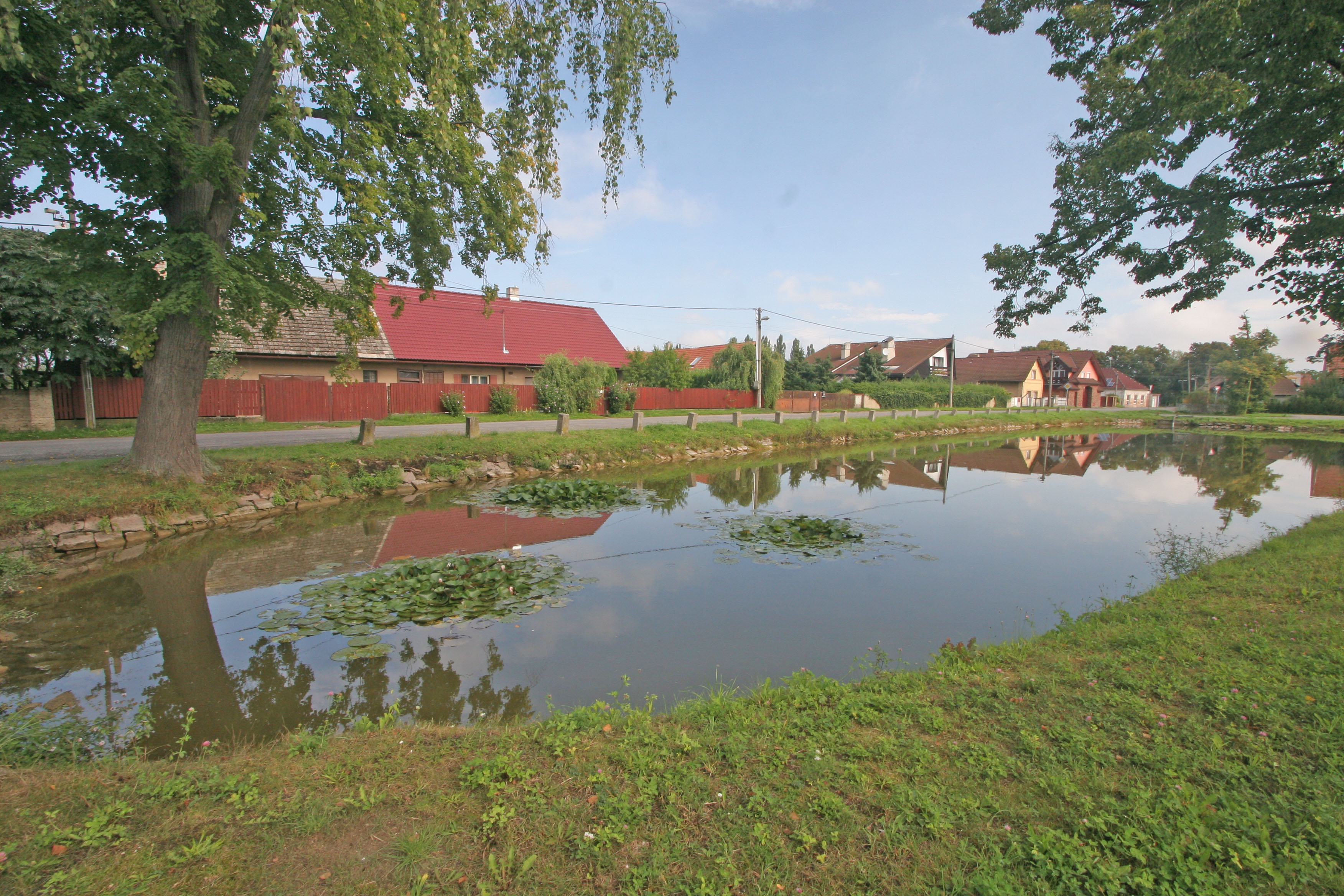 Škudly rybník